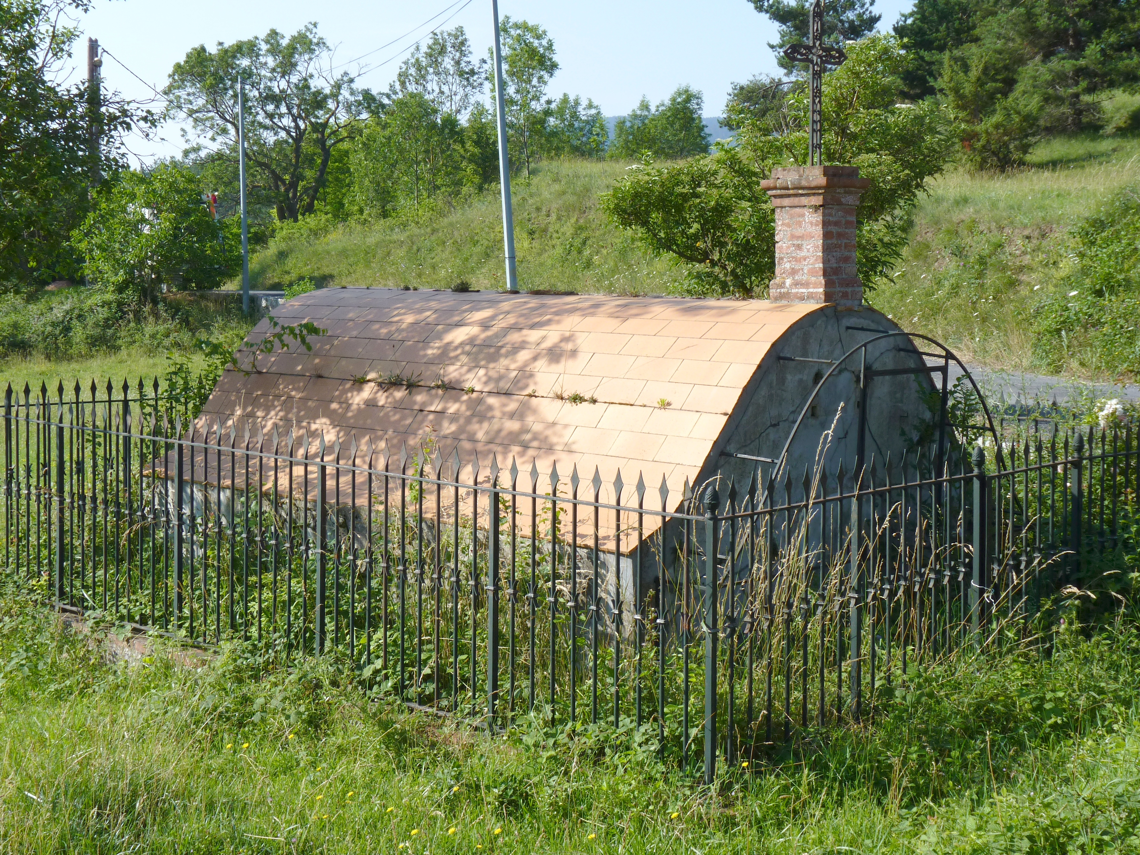 Petit Caveau (famille Costa) à la sortie du village près de la place, Coustouges (Pyrénées-Orientales, Languedoc-Roussillon, France)